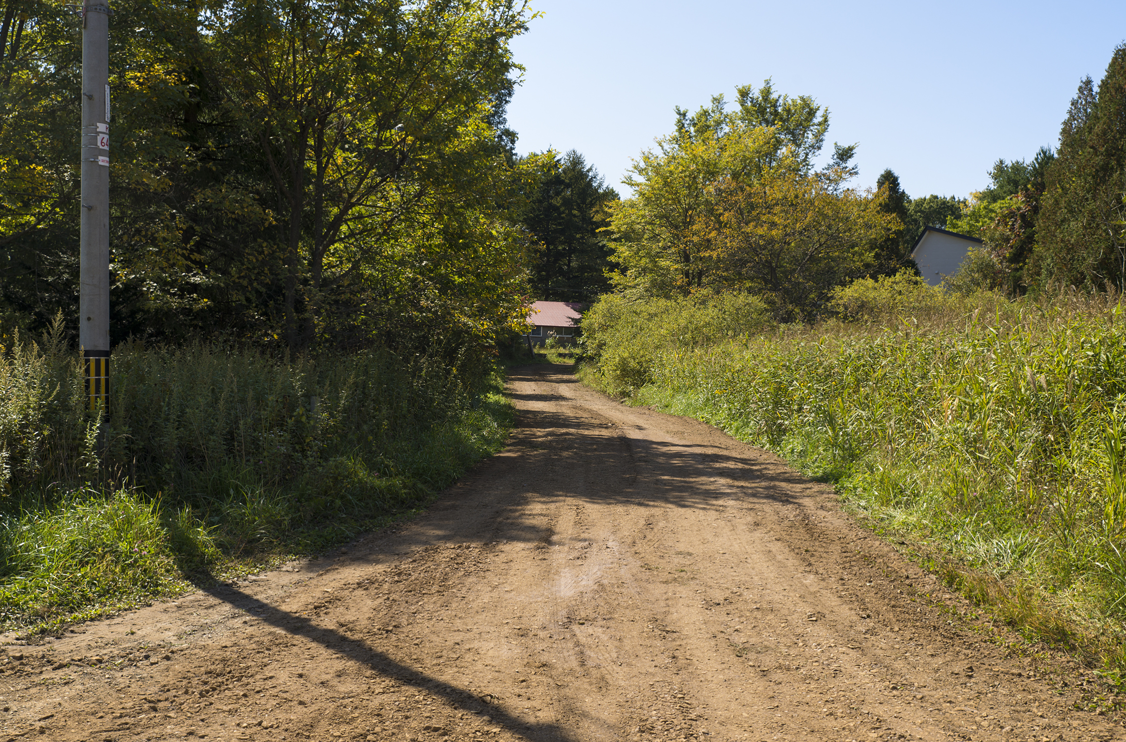 北海道旅客鉄道株式会社函館本線赤井川駅駅前風景